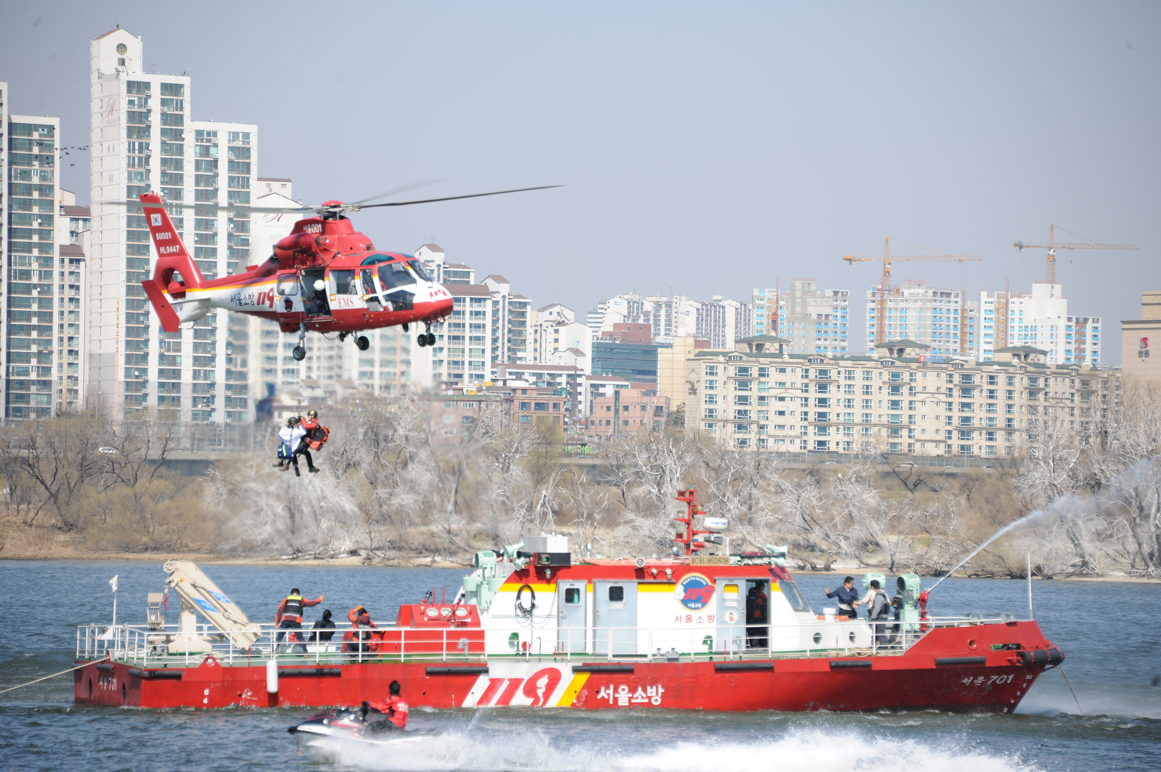 서울특별시 119특수구조단 수난구조대 소방 활동 사진